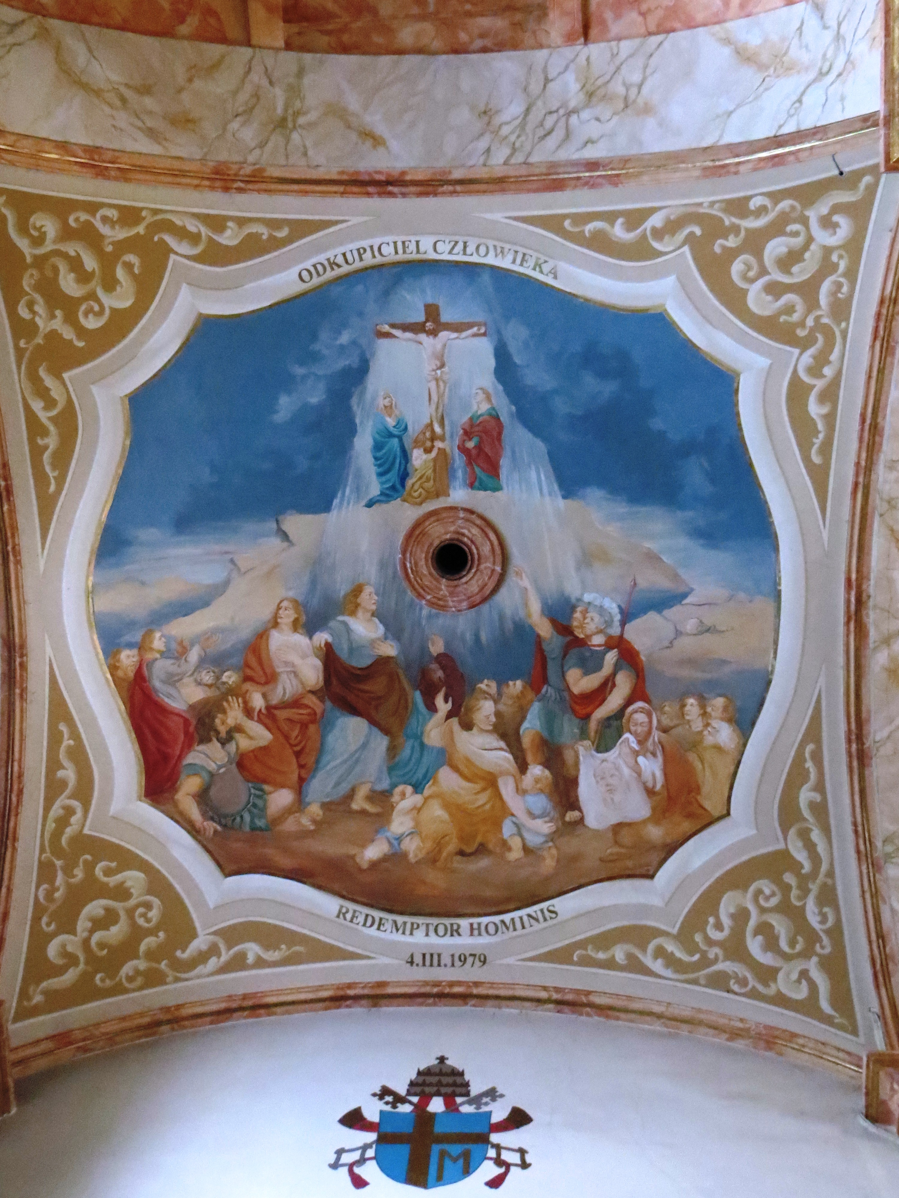 Malowidła na suficie w bazylice ONMP w Wadowicach.